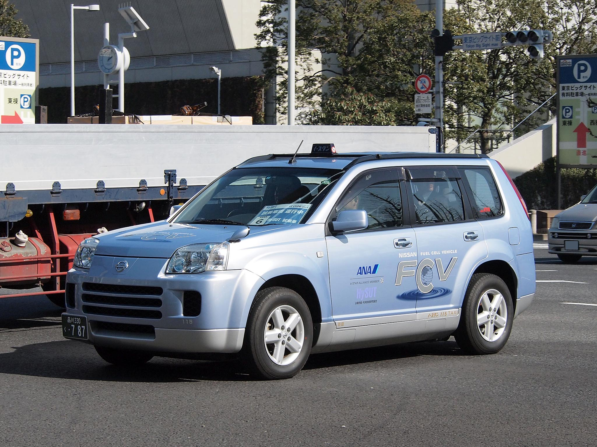 イースタンエアポートモータースの日産エクストレイルFCV。水素供給・利用技術研究組合(HySUT)の水素ハイウェイプロジェクトの一環として貸与され、主に羽田空港発着のタクシーとして運行される。 登録番号：品川330く・787 撮影地：東京都江東区、東京ビッグサイト付近 国際水素燃料電池展(FC EXPO)試乗車両